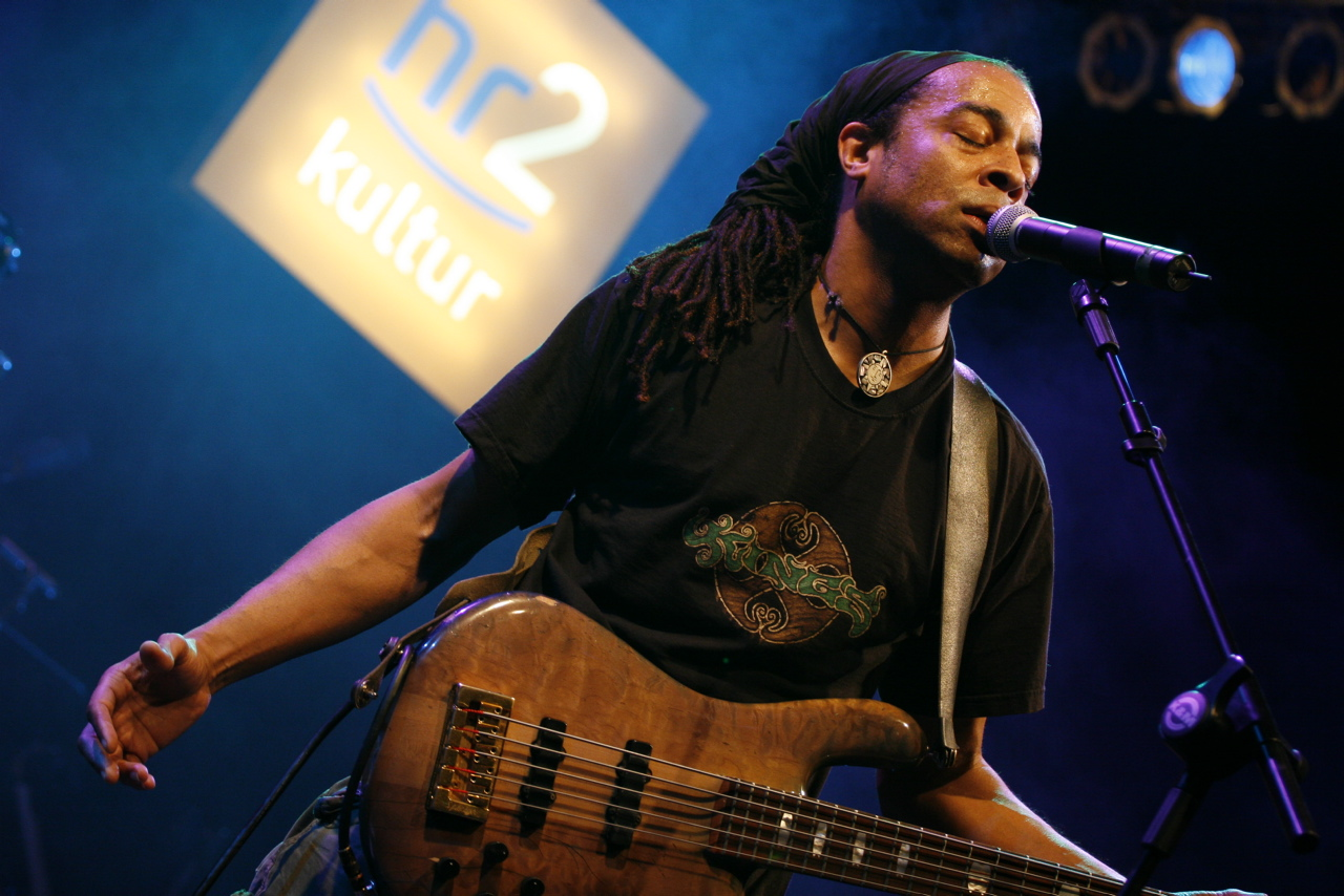 David Wimbish